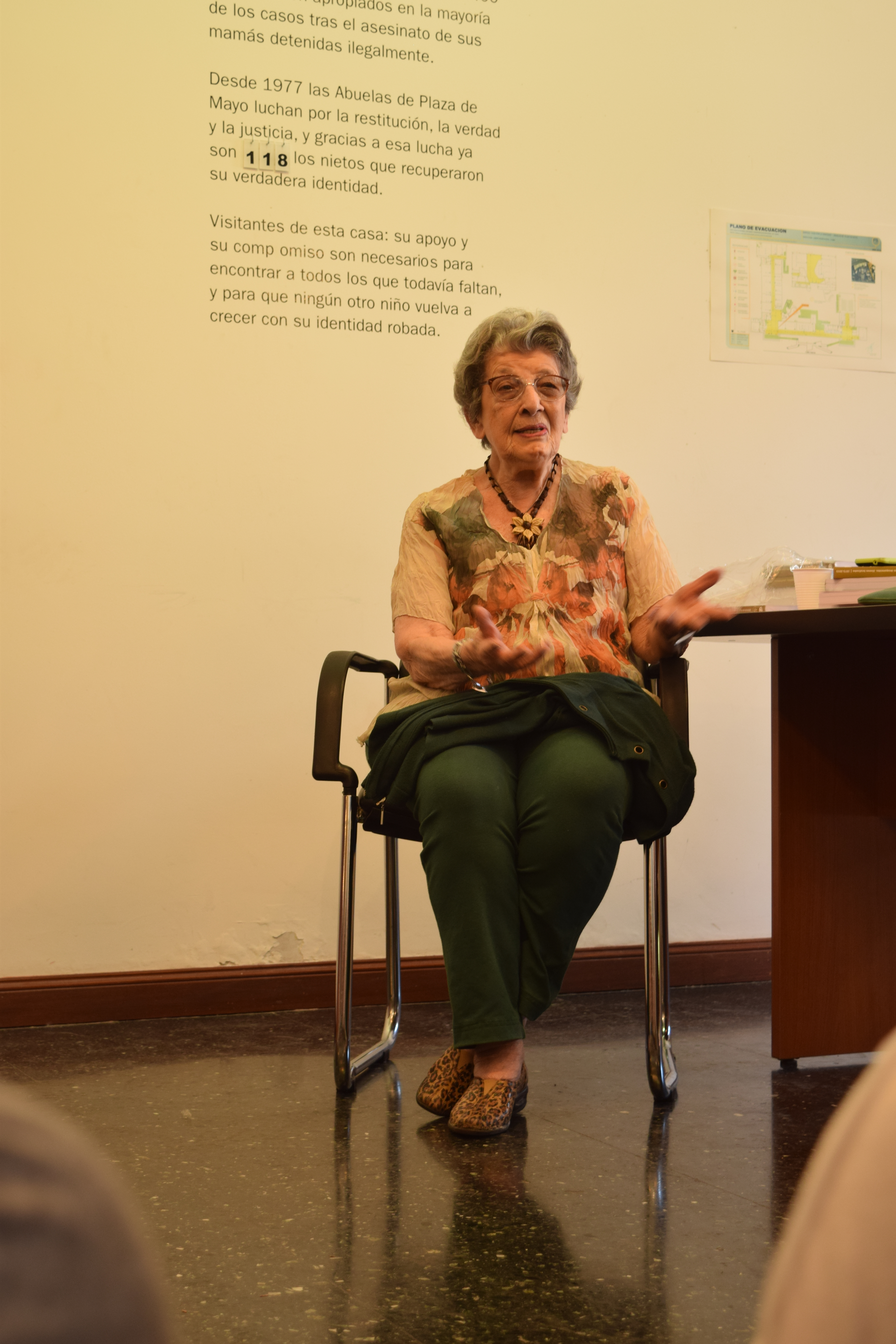 Delia Giovanola, una de las fundadoras de Abuelas de Plaza de Mayo durante una editatón realizada por Wikimedia Argentina en el ex predio de la ESMA en Buenos Aires, Argentina.